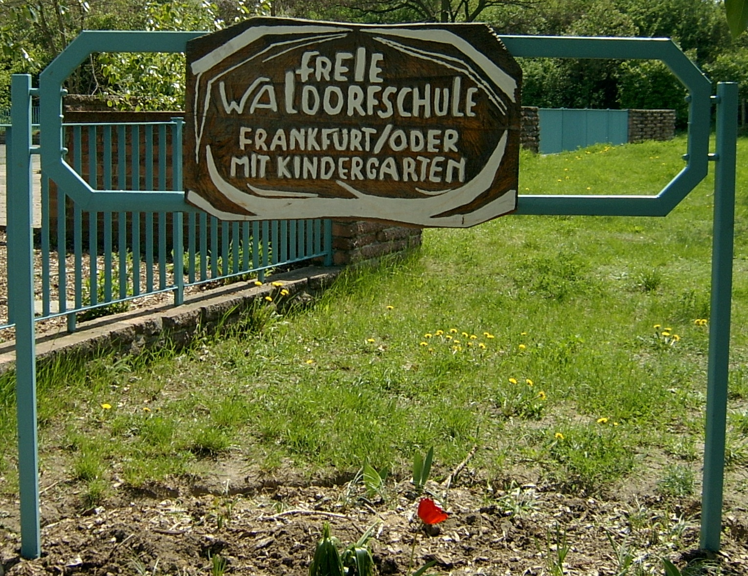 Freie Waldorfschule Frankfurt (Oder)